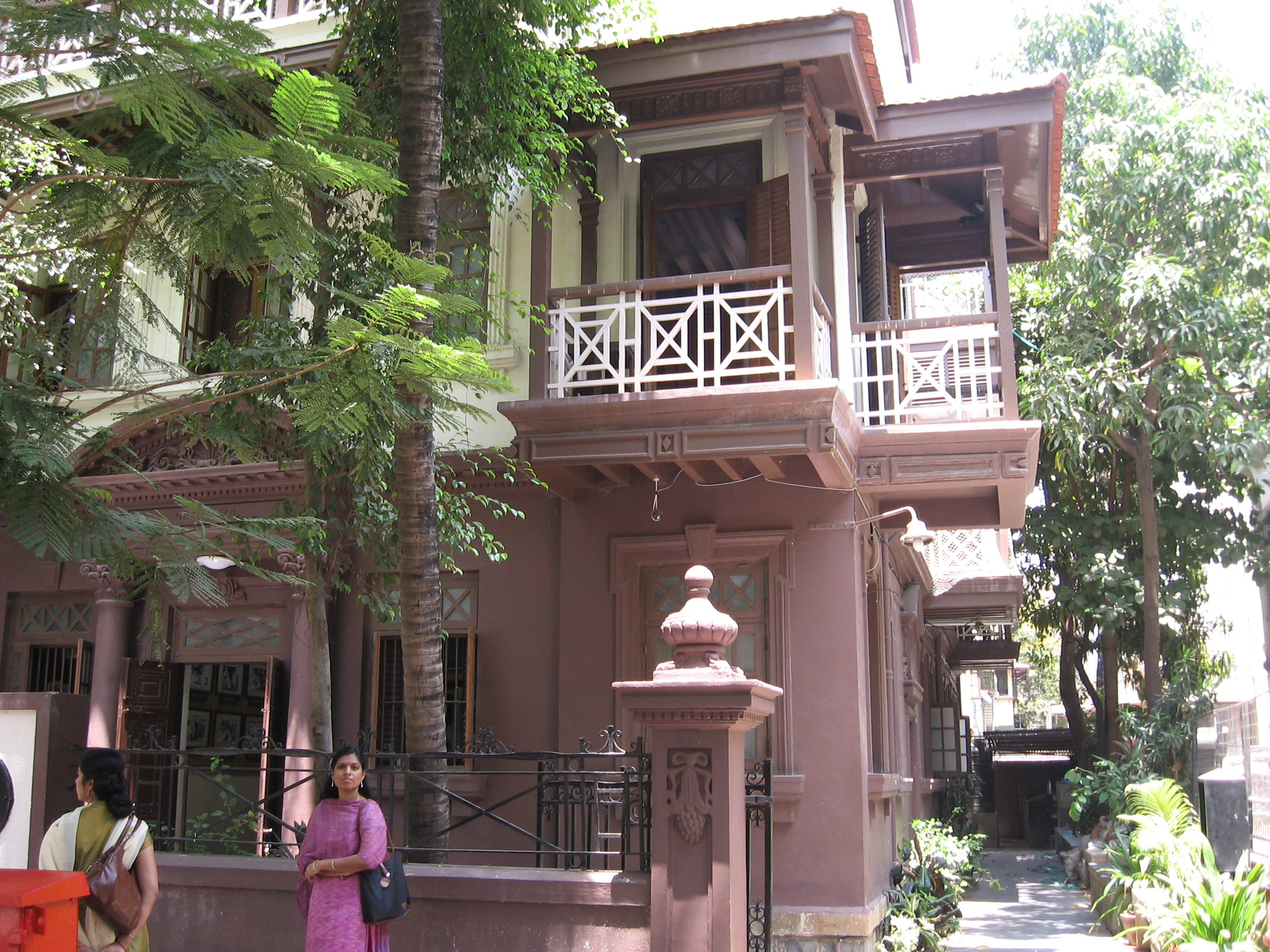 Mani Bhavan